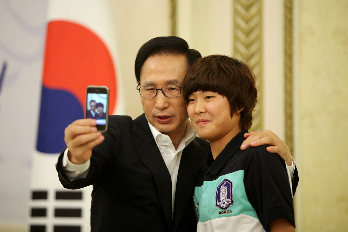 President Lee Myung-bak and Ji So Yun